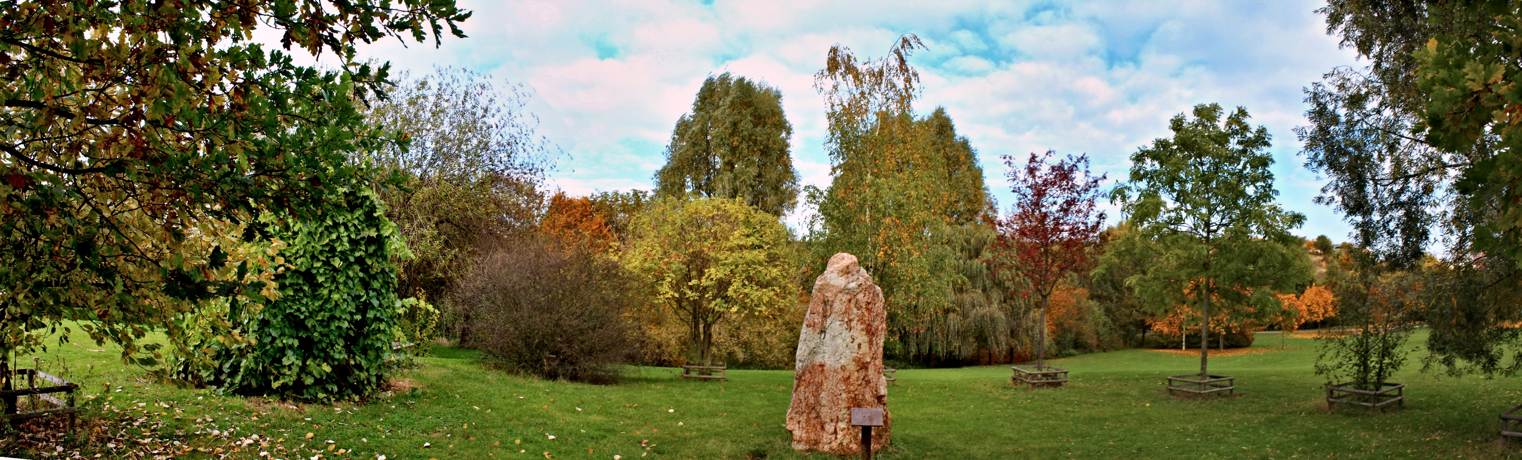 Keltský stromový kalendář, Centrální park (Stodůlky)